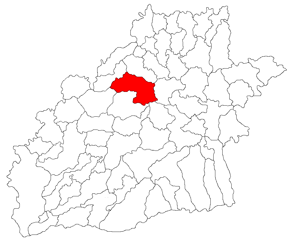 Categorie:Hărţi ale judeţului Sibiu